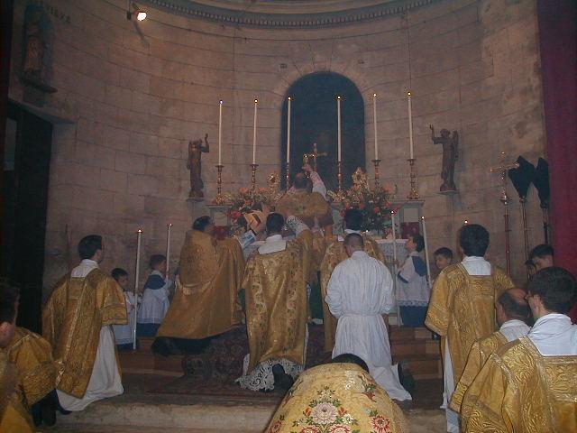 Liturgie neo-gallicane - Messe en rite versaillais - Élévation du calice